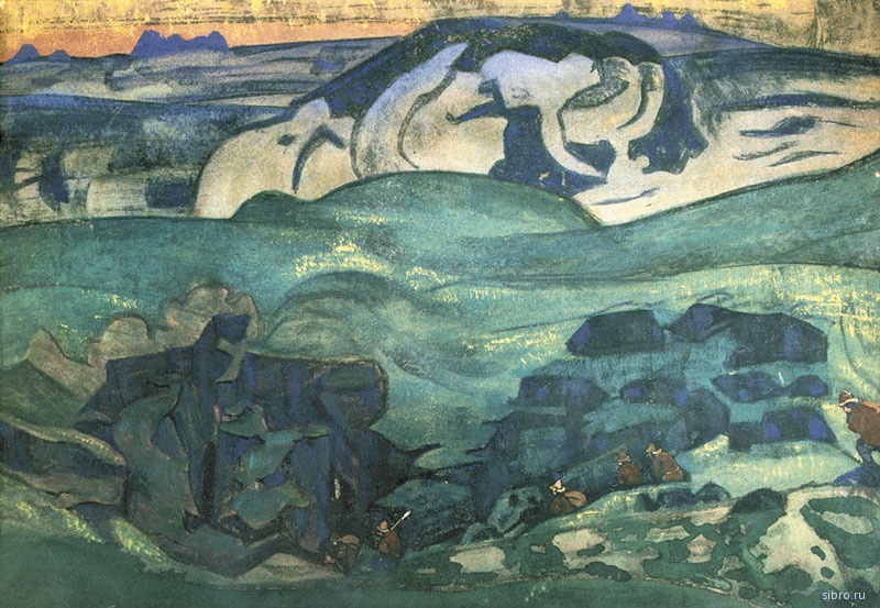 Картина Н.К.Рериха Чудь подземная (Чудь под землю ушла) 1913